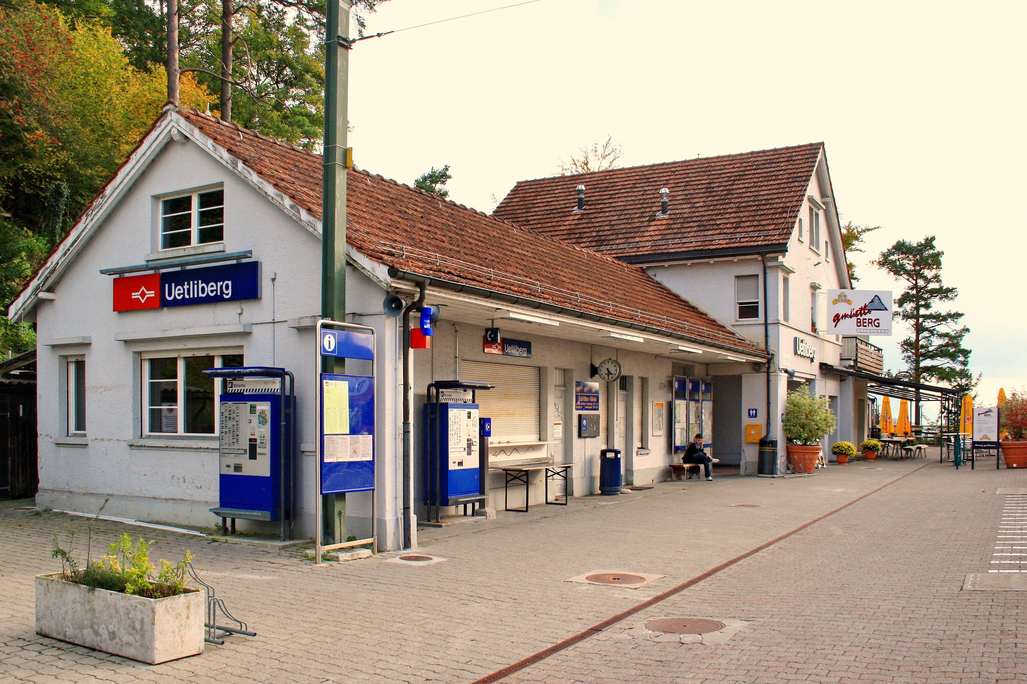 Uetlibergbahn (S-Bahn line S10) hill station Gmüetliberg